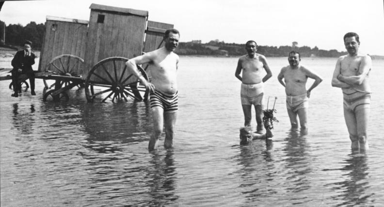 Besuch des Reichspräsidenten Ebert und des Reichswehrministers Noske in Haffkrug zur Eröffnung des Kinderheimes der PRO-Stiftung 1919; v.l. die PRO-Vorstandsmitglieder Julius Müller, Gustav Lehne, Josef Rieger (im Wasser), Henry Everling Foto: Wilhelm Steffen, Haffkrug